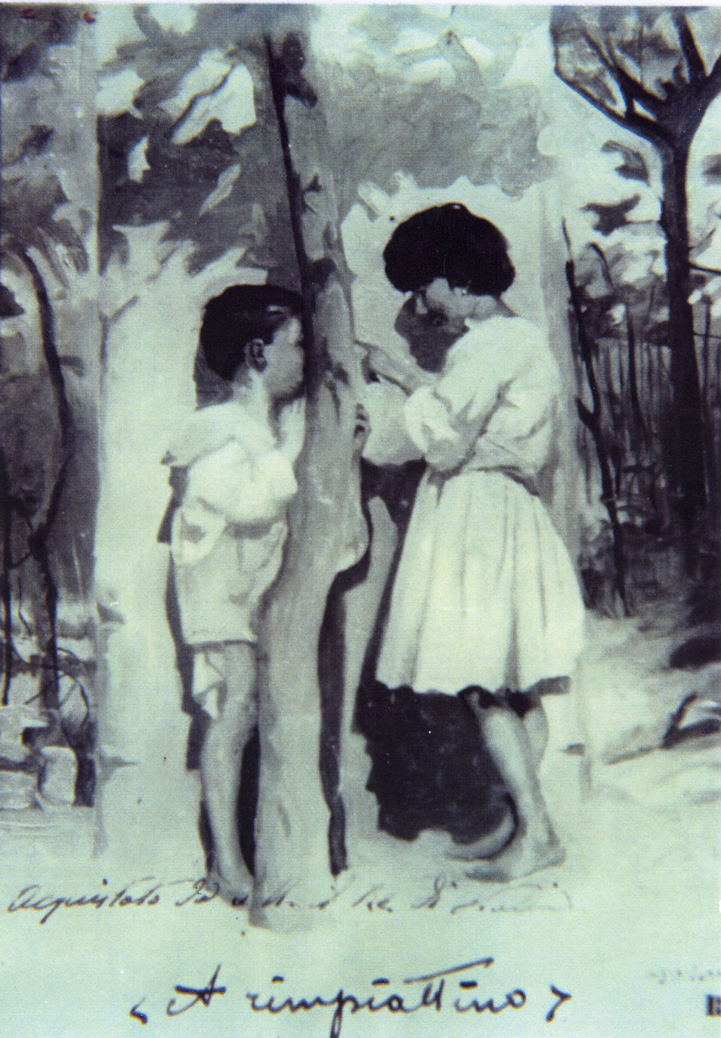 A rimpiattino - esposto a Napoli nel 193 - acquistato dal re Vittorio Emanuele III - oggi al Quirinale